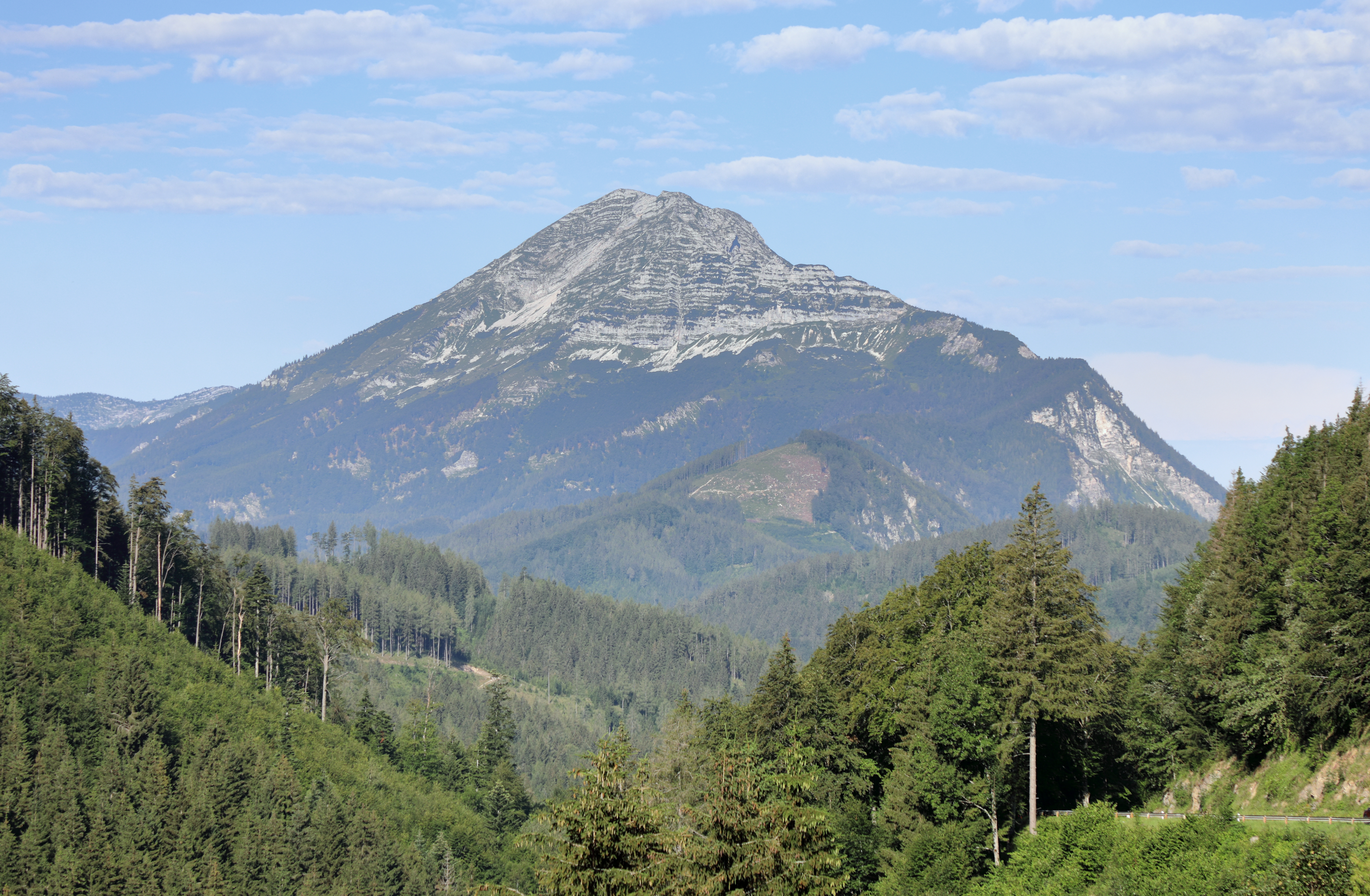 Blick von der niederösterreichischen Gemeinde Annaberg auf den Ötscher bzw. Ostansicht des 1893 m hohen Ötschers.